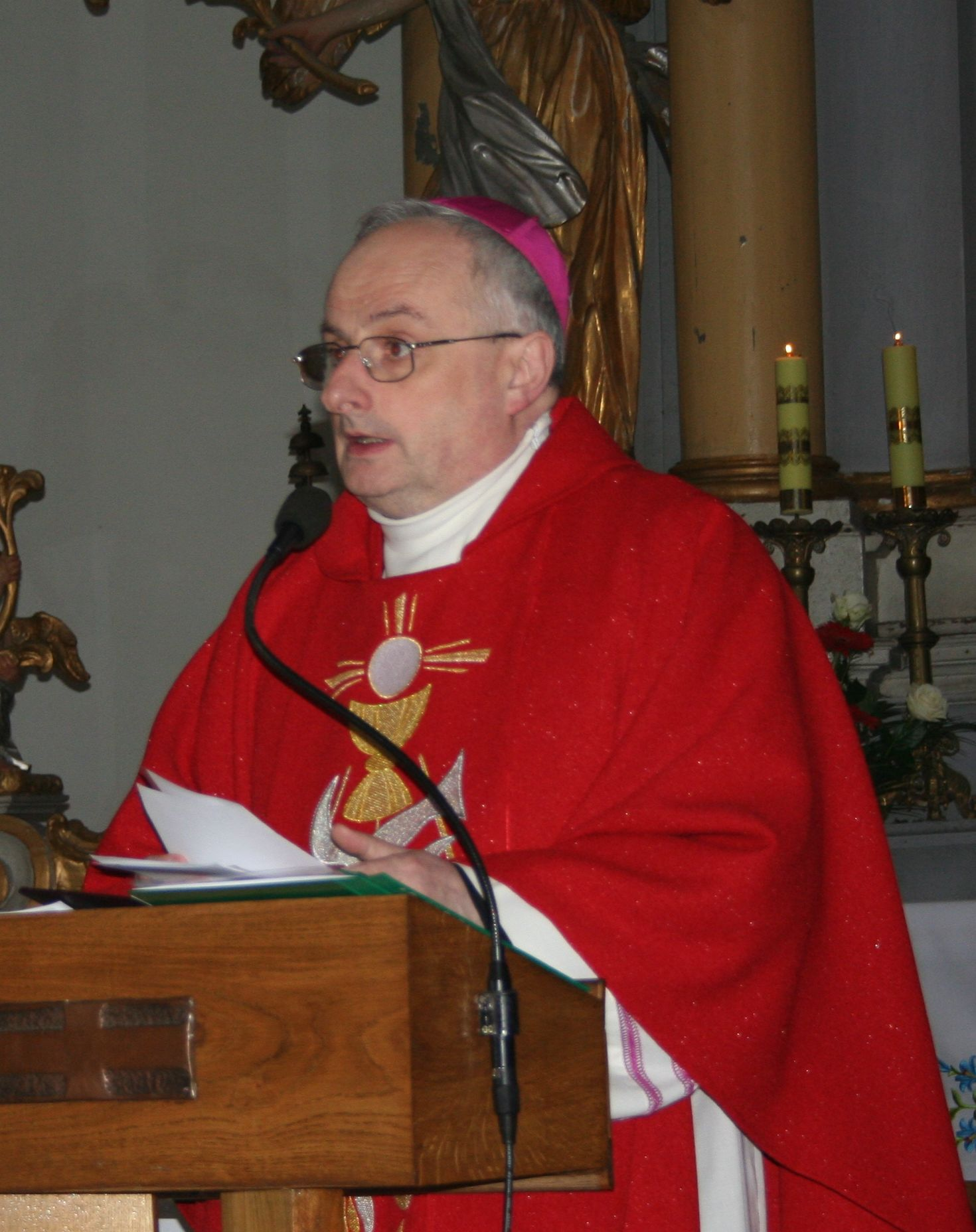 biskup Jacek Jezierski podczas bierzmowania w Bisztynku